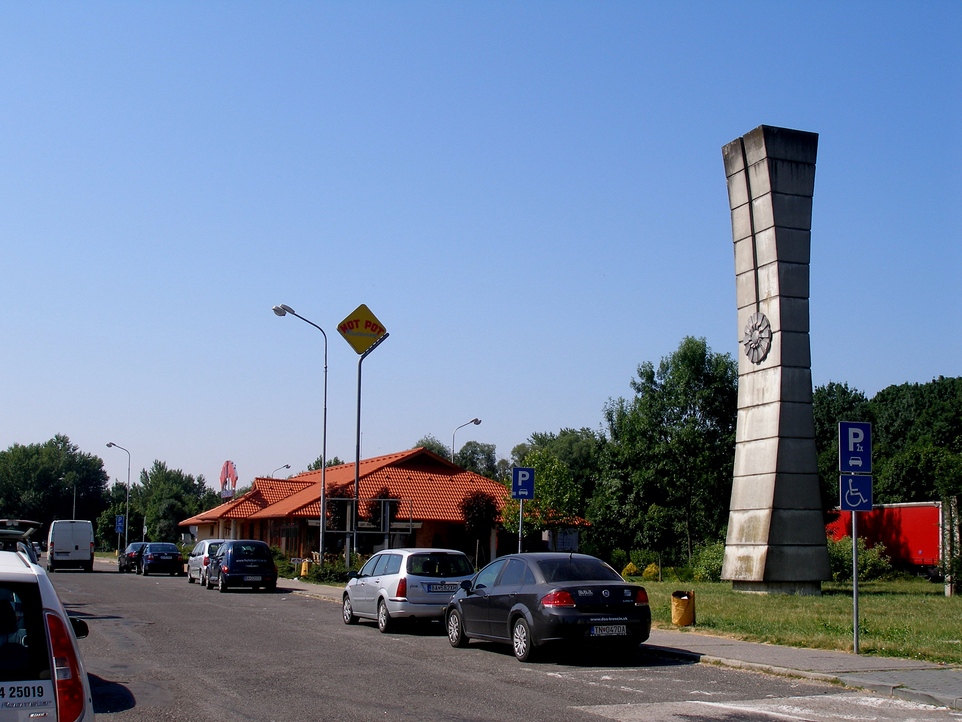 Odpočívadlo pri diaľnici D1 v katastri obce Červeník, okres Hlohovec.